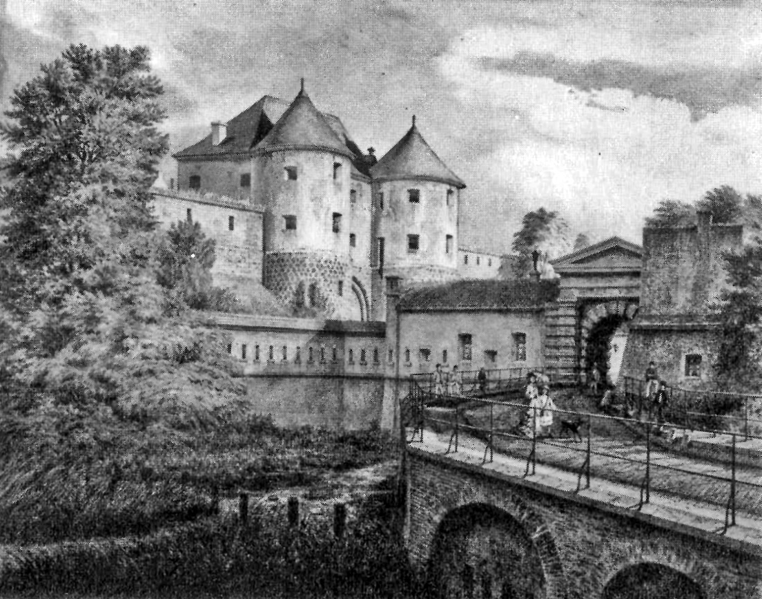 Weyertor, Köln 19. Jahrhundert. Ansicht von der nordwestlichen Feldseite